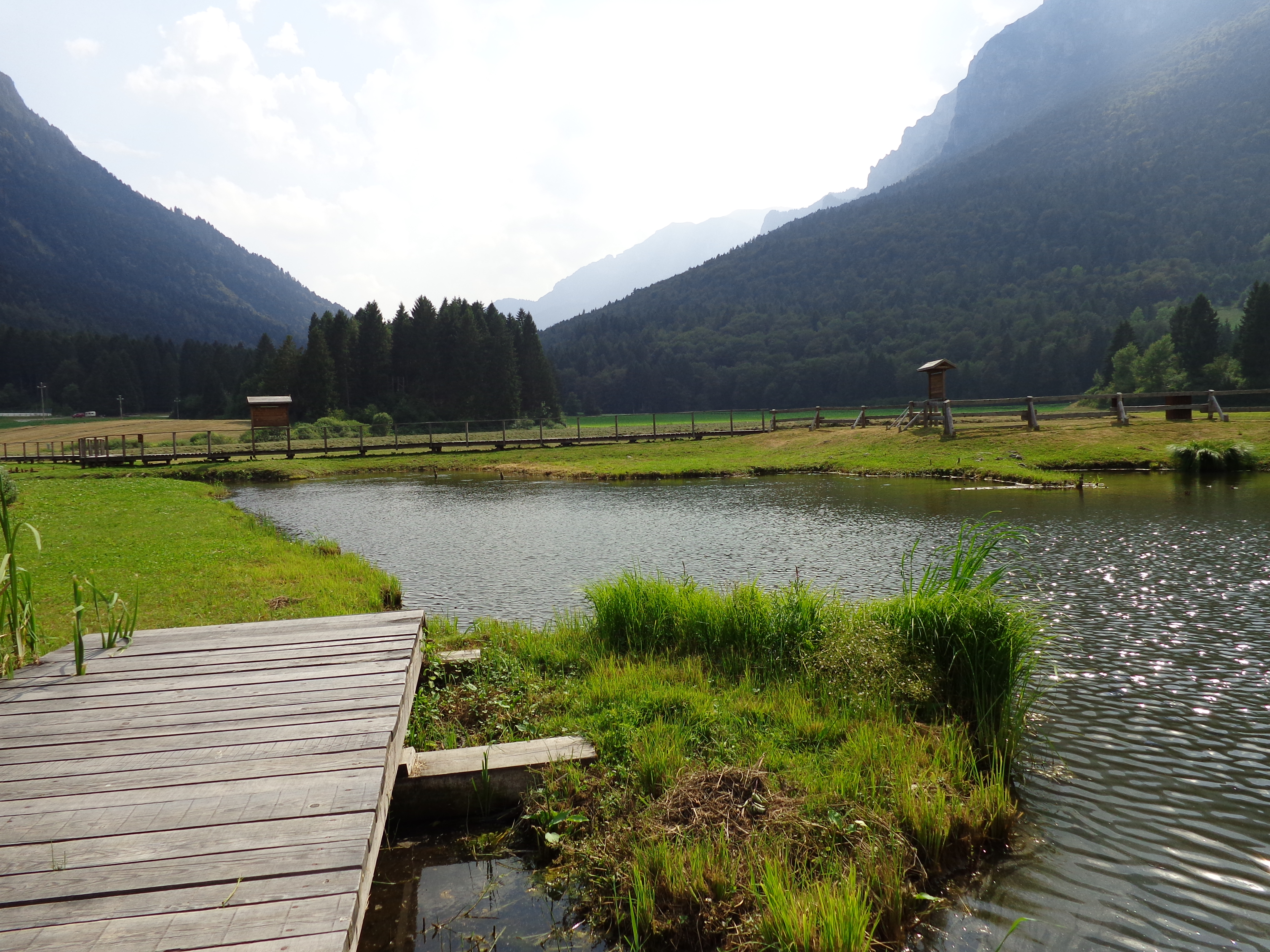 Biotopo Lomasona (Q3640220)